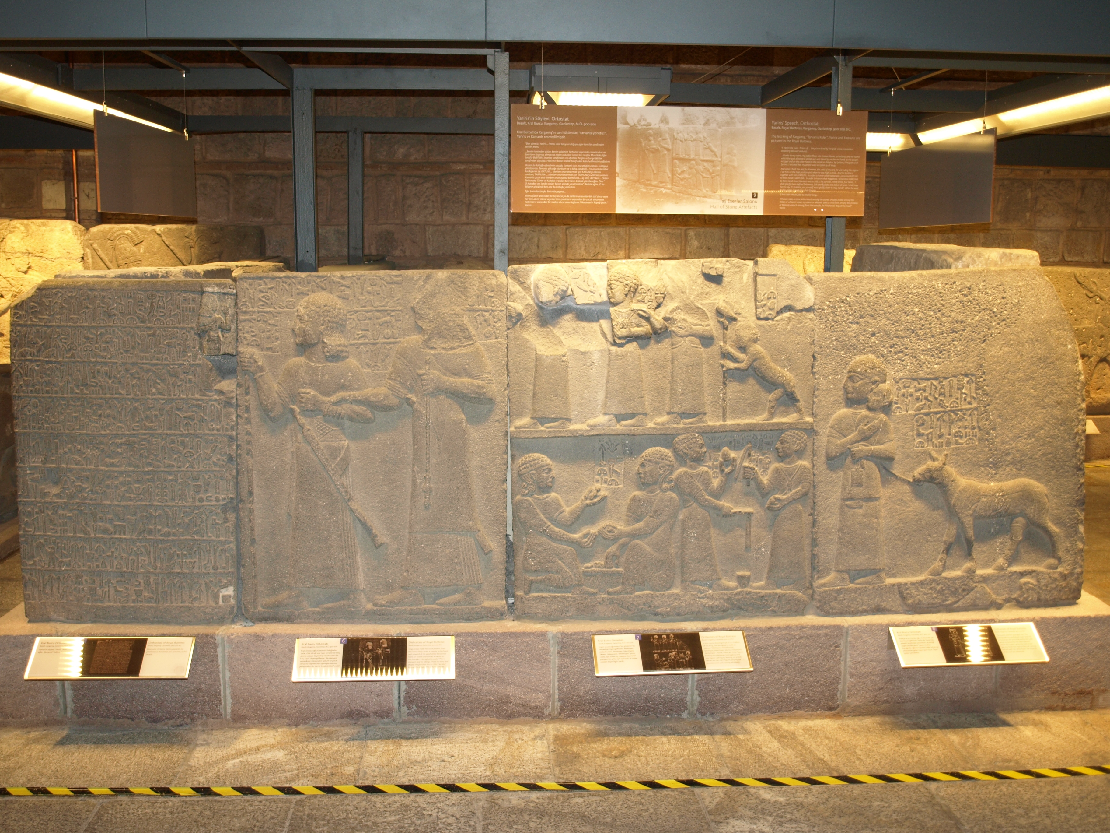 Relief von Yariri und Kamani (Karkemiš) ausgestelltes Ensemble